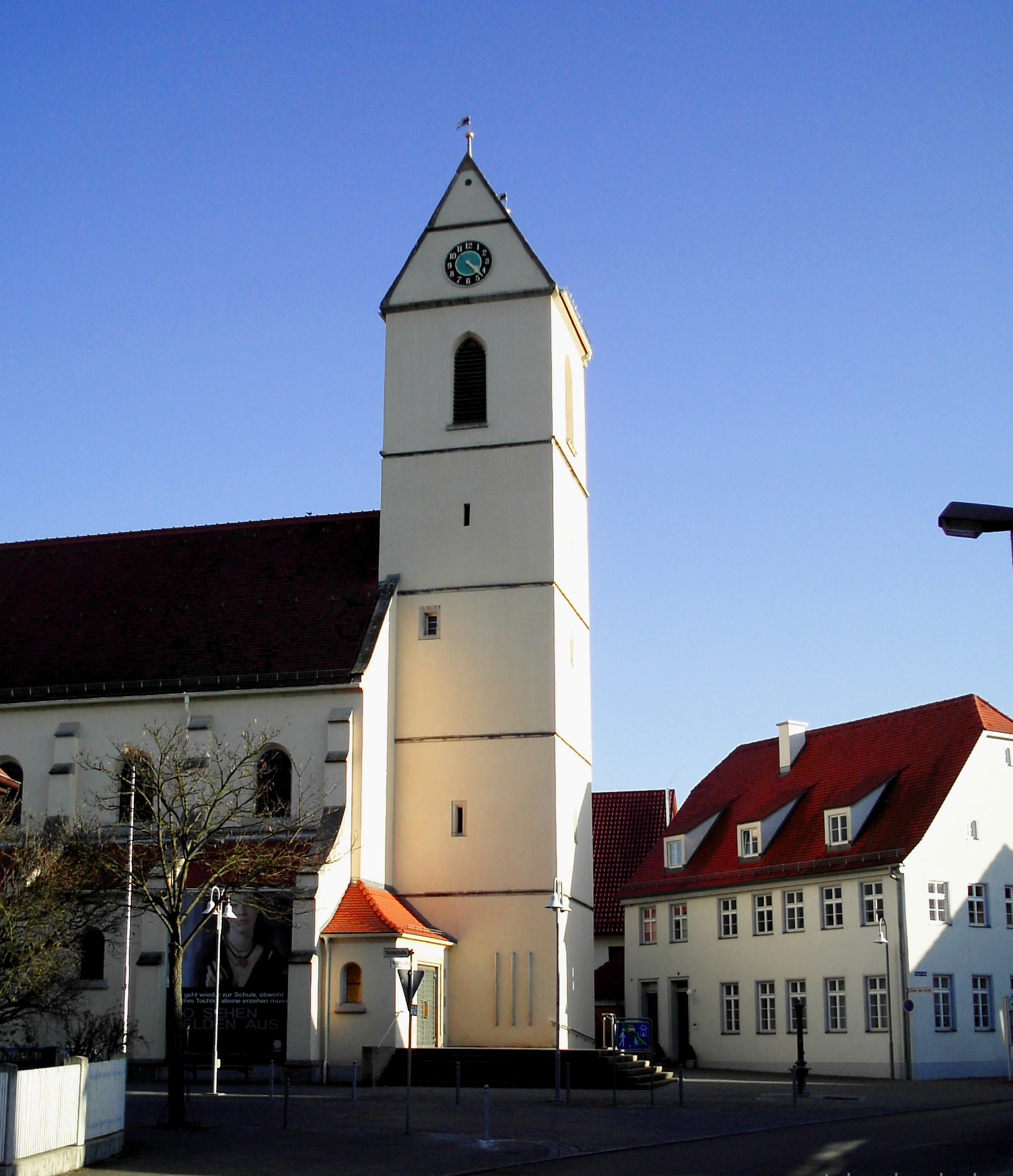 Die St.-Kolumban-Kirche in Wendlingen_am_Neckar